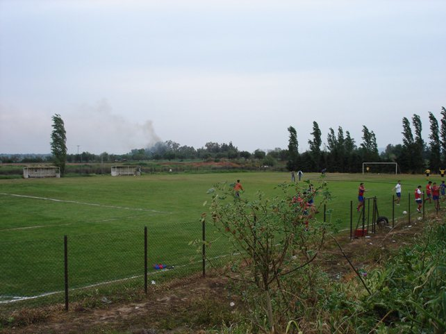 Vouprasio Groud Achaea GreeceΓήπεδο Βουπρασίου